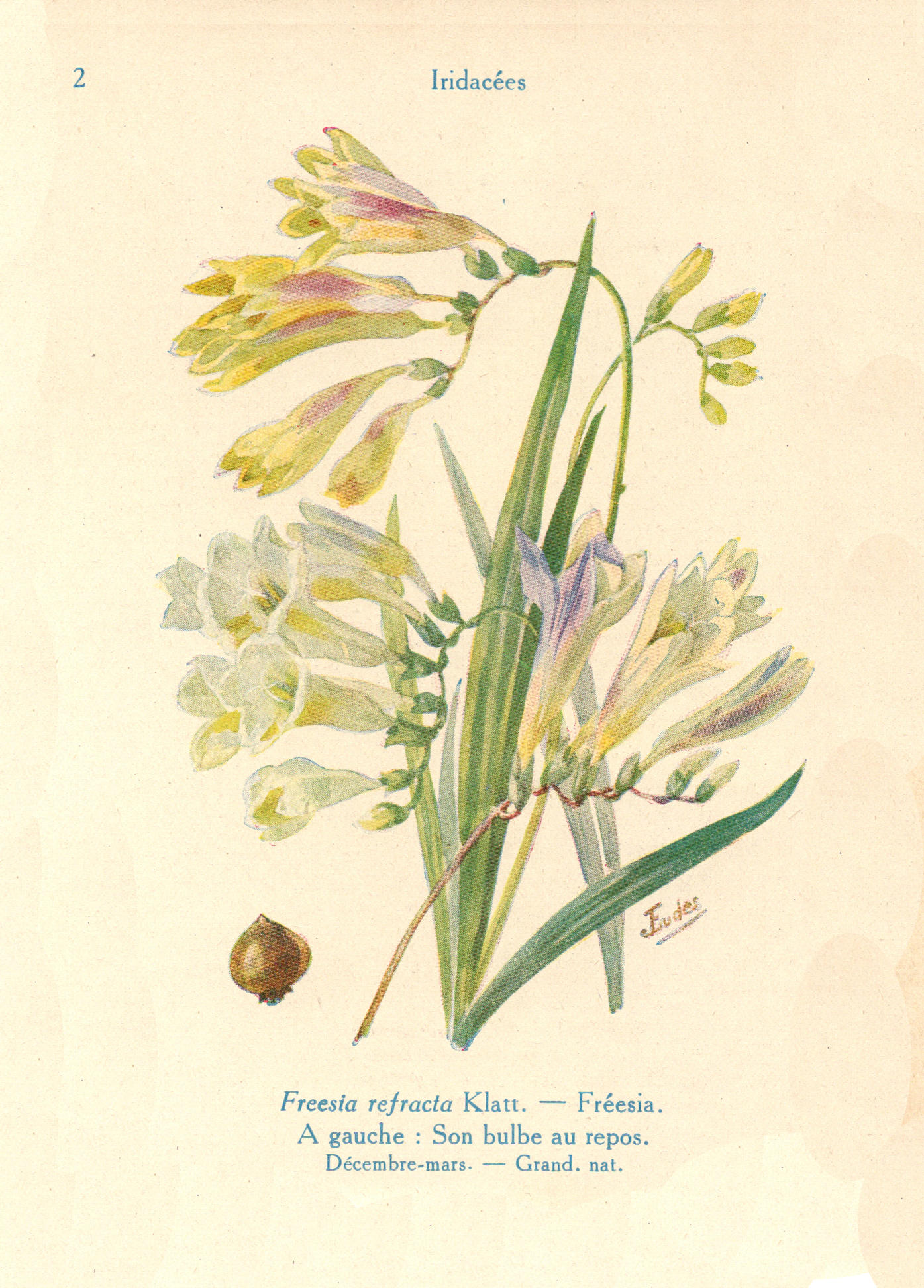 D'après les aquarelles de J. Eudes dans : A. Guillaumin, Les Fleurs de Jardins, tome I : Les Fleurs de Printemps, Paul Lechevalier, 1929